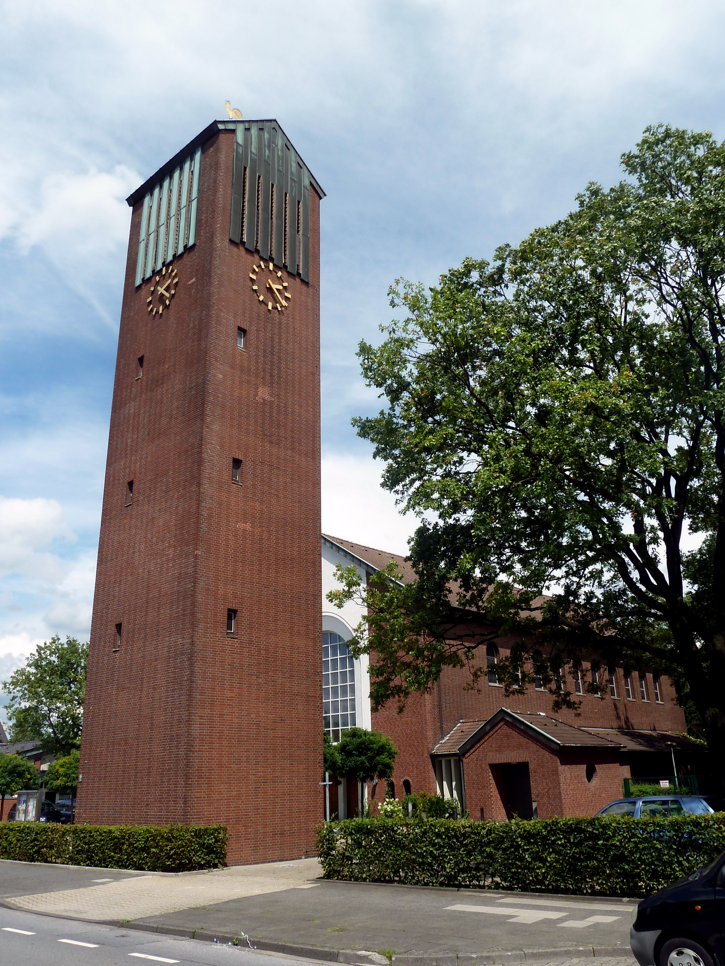 BOT- Fuhlenbrock - Parabelkirche St. Bonifatius fertiggestellt 1929